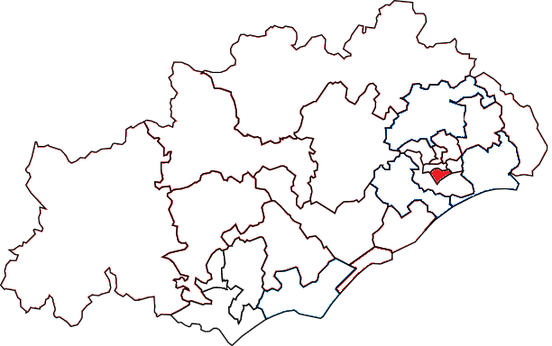 Situation du canton dans le département de l'Hérault